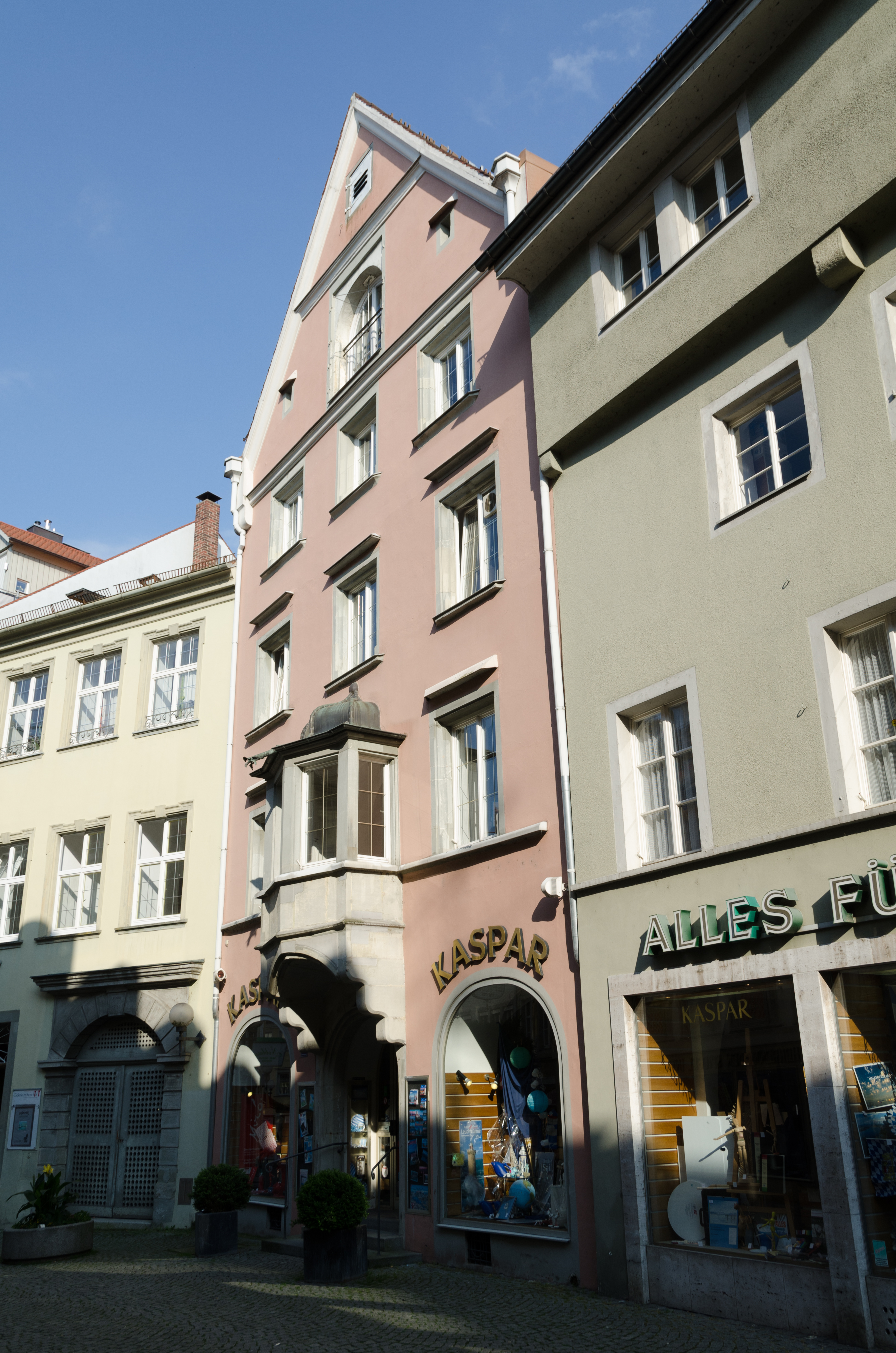 Lindau, Cramergasse 11